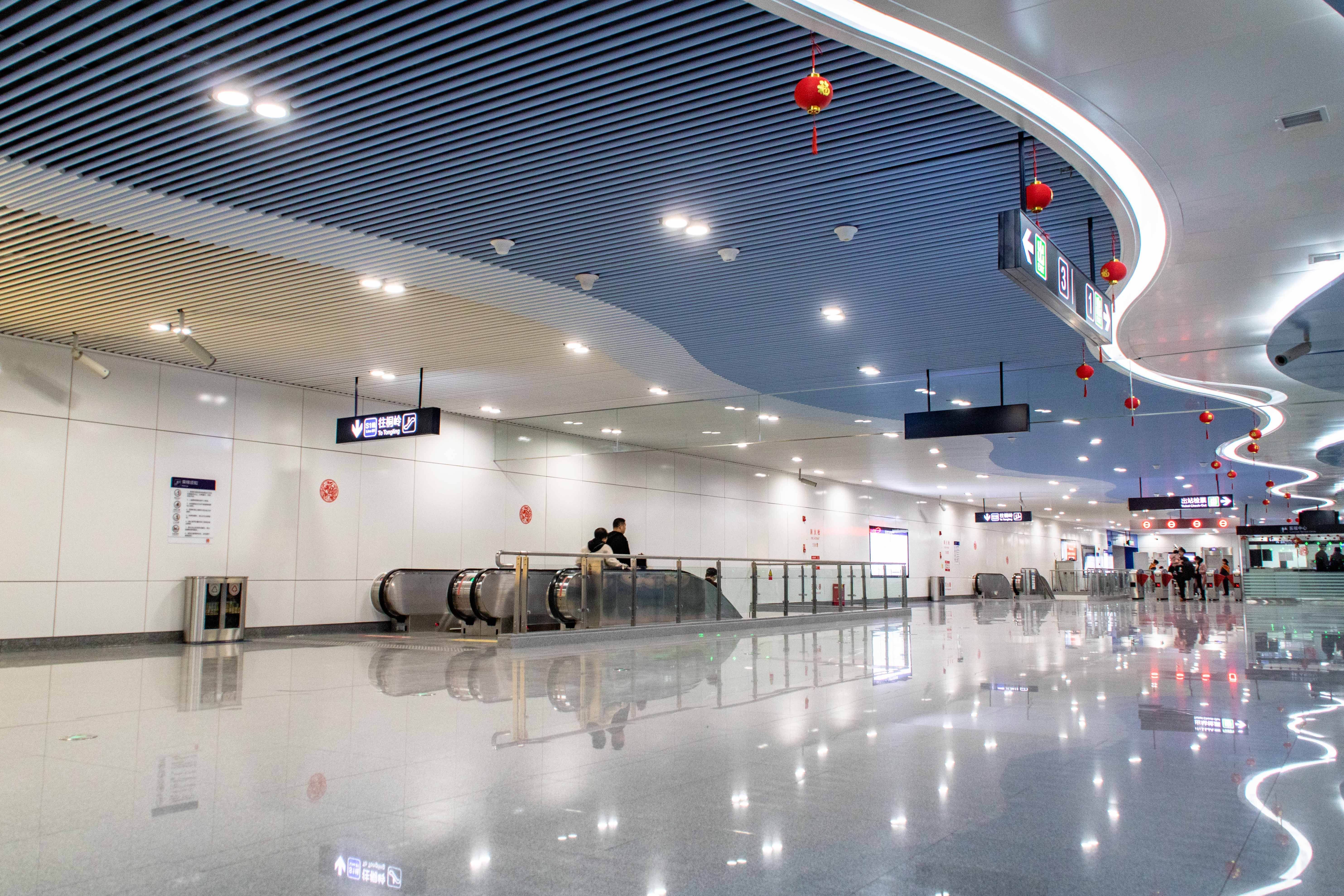 中文（中国大陆）: 奥体中心站站厅